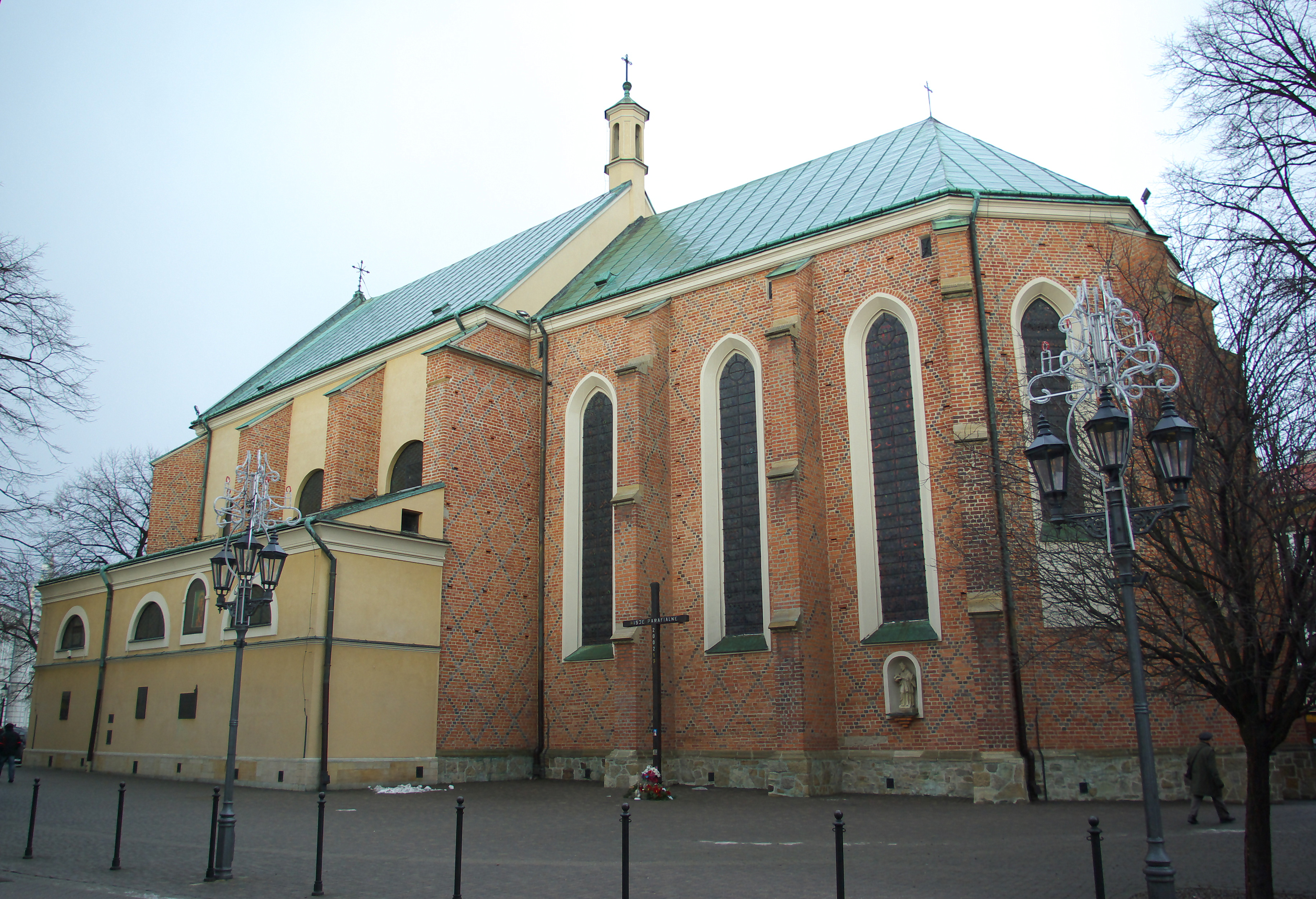 Kościół św. Wojciecha i św. Stanisława w Rzeszowie